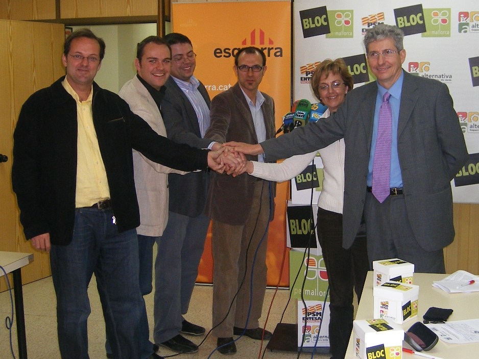 acord adhesió ERC al BLOC